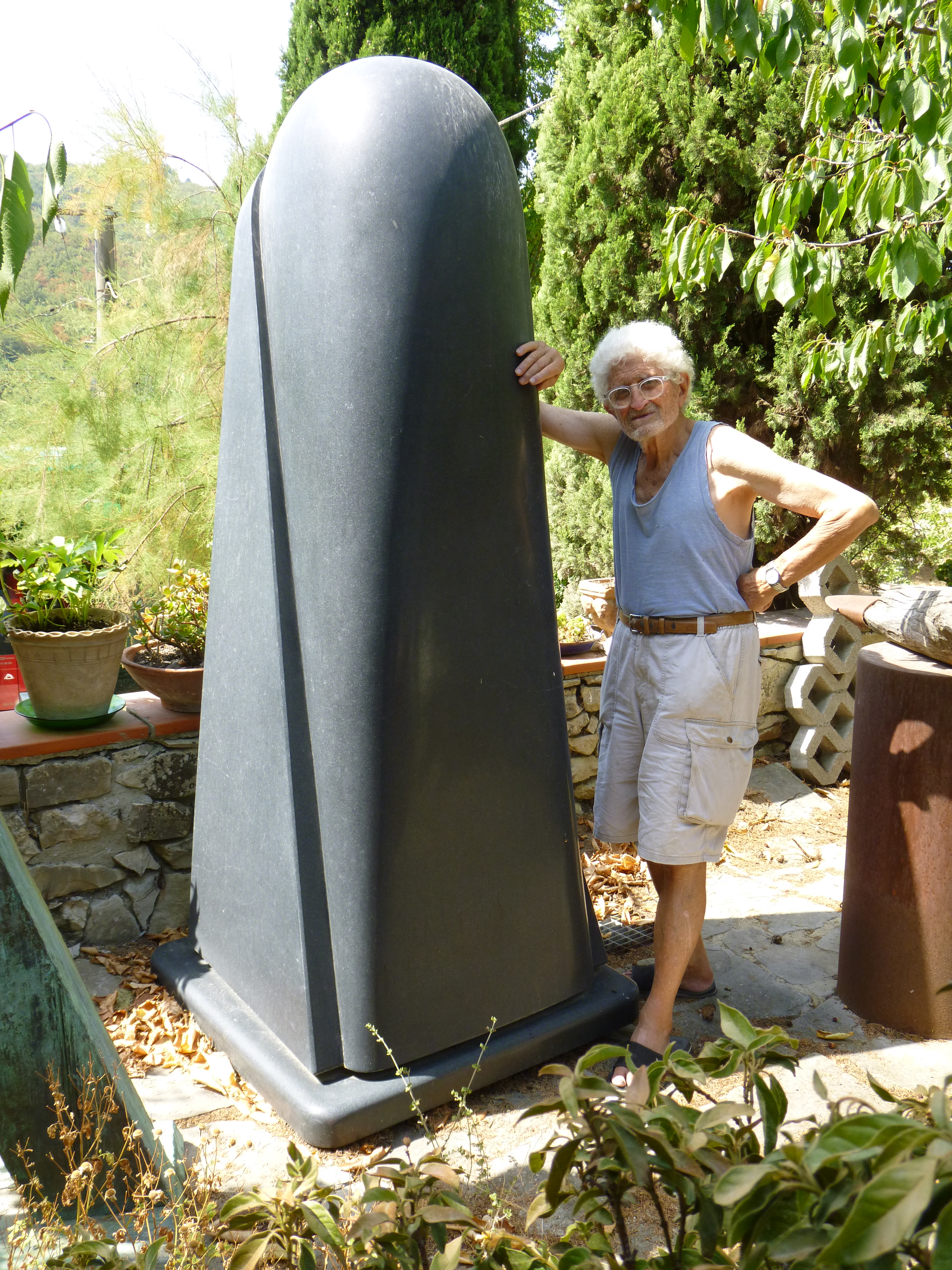 Marcello Guasti agosto 2012